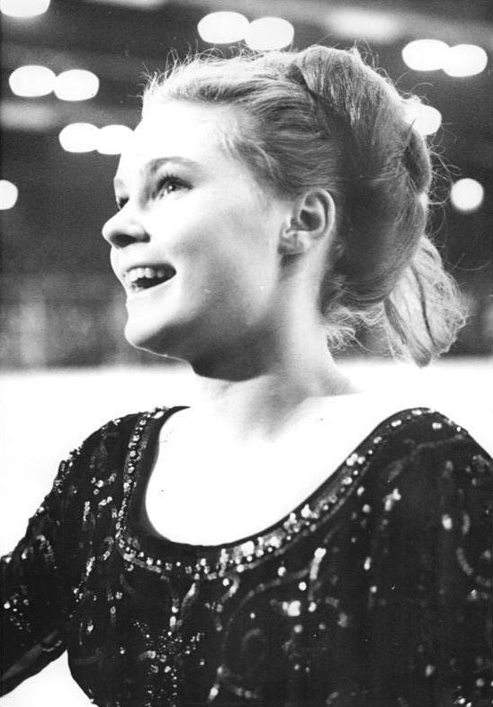 Gabriele Seyfert Zentralbild Kohls 26.1.1966 Eiskunstlauf-Europameisterschaften 1966 DDR - Teilnehmer: Gabriele Seyfert (SC Karl-Marx-Stadt), EM-Fünfte des letzten Jahres, geboren am 23.11.1948. Die Europameisterschaften finden vom 1.-6.2.1966 in Bratislava statt. (wird fortgesetzt) - Archivfoto